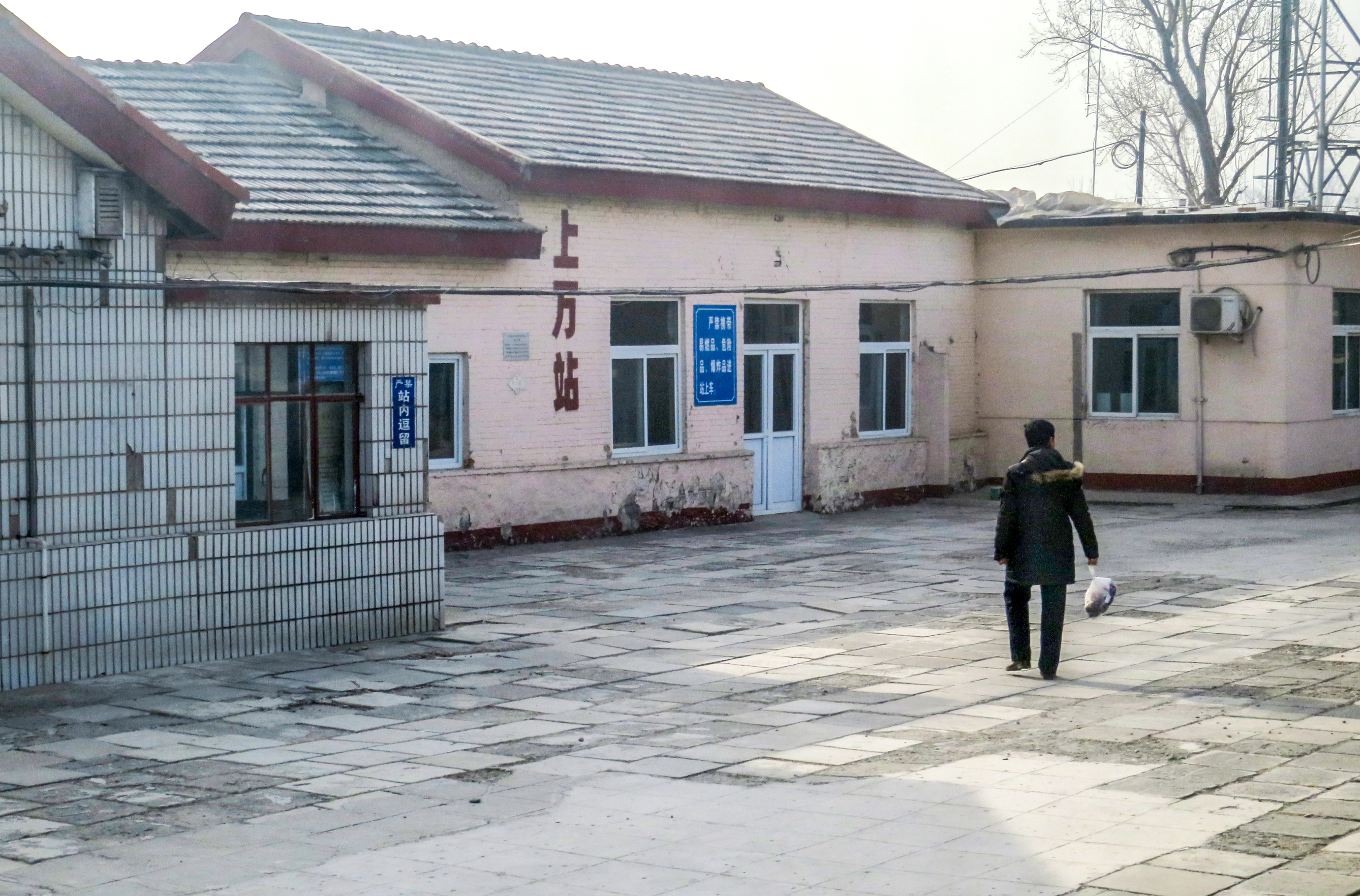 京原铁路上万站